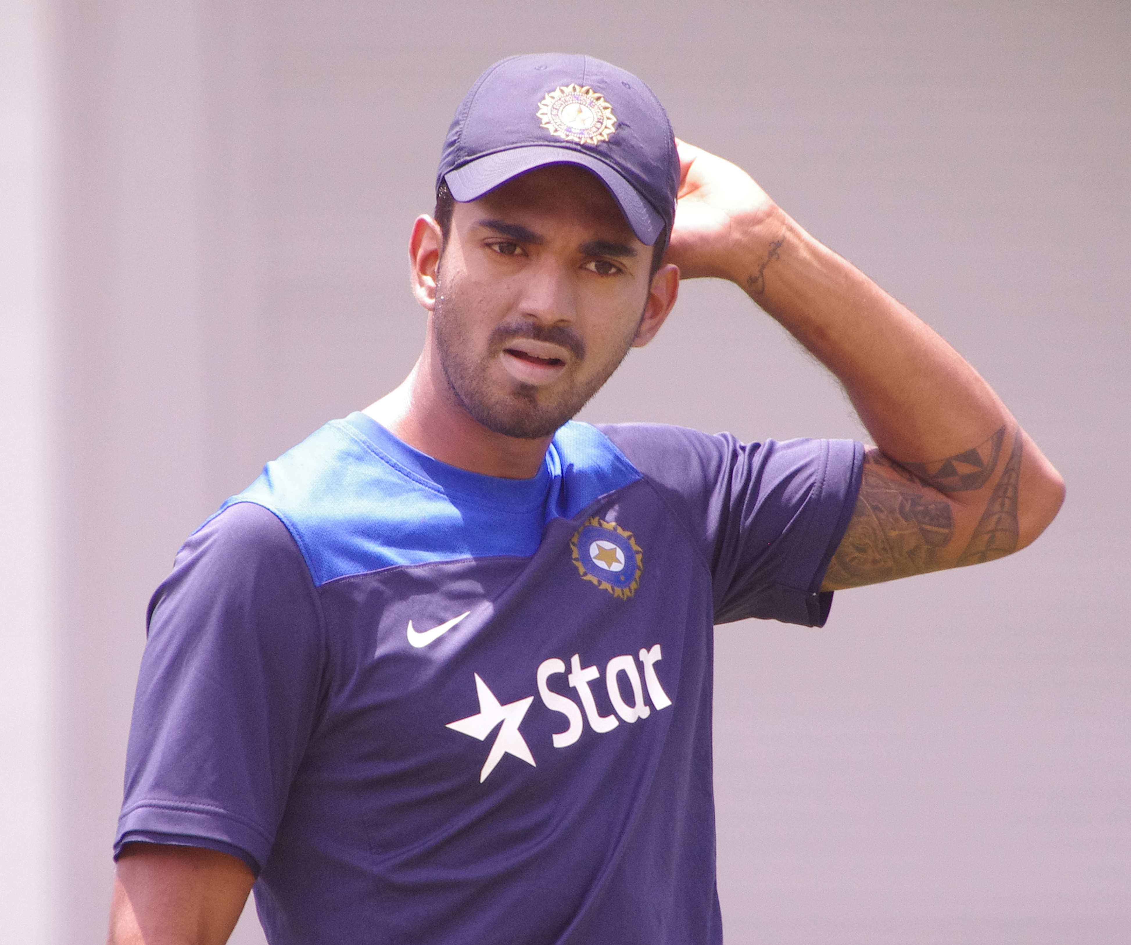 LOKESH RAHUL